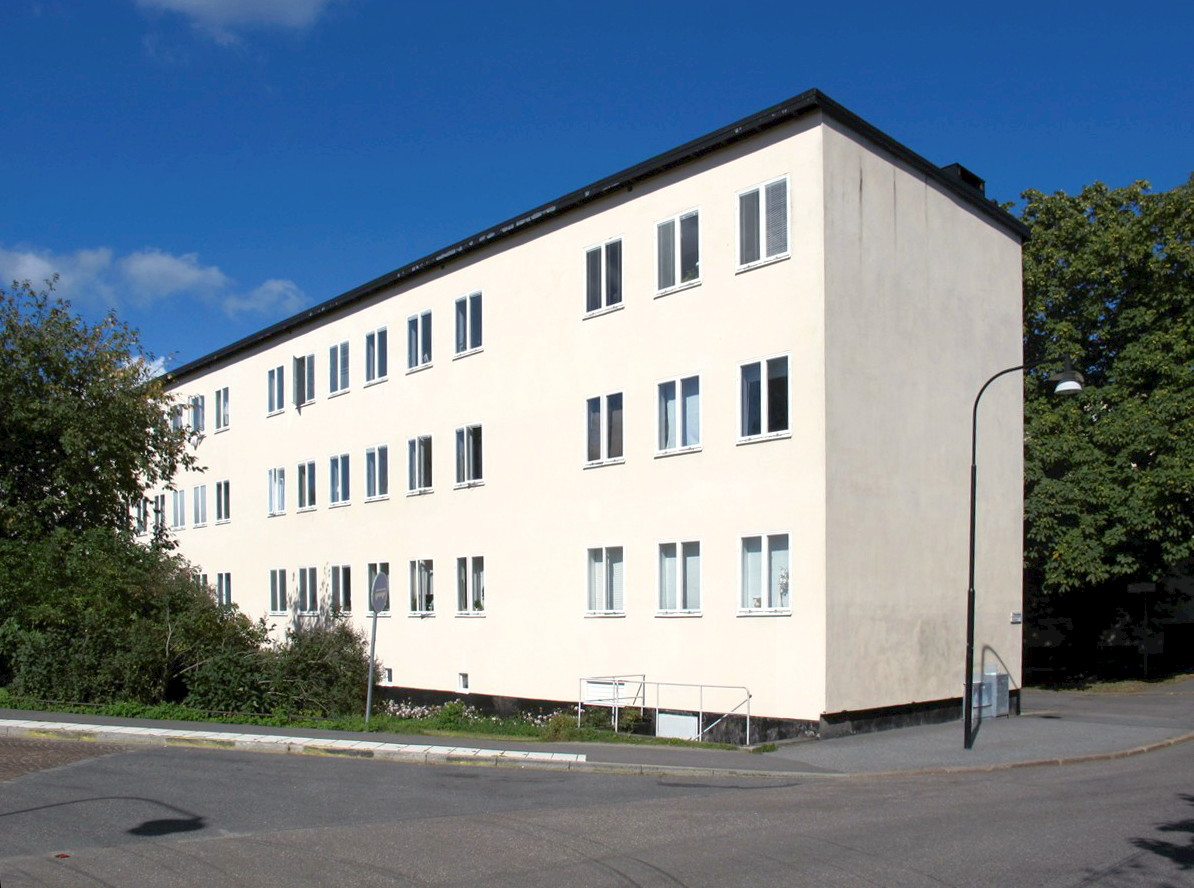 Bostadsområdet Abessinien i Hjorthagen i Stockholm